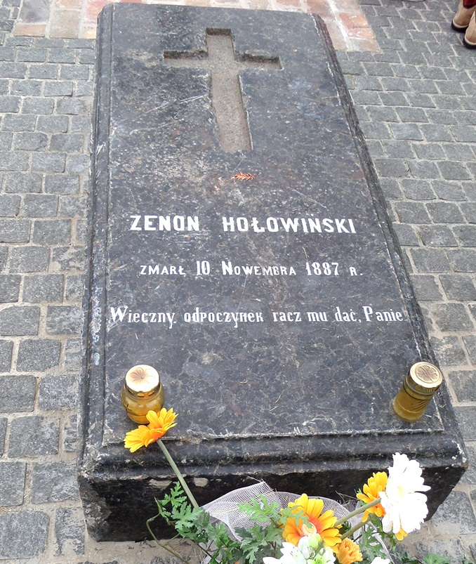 Płyta grobowa Zenona Hołowińskiego z cokołu rozebranego pomnika Lenina. CNT television.